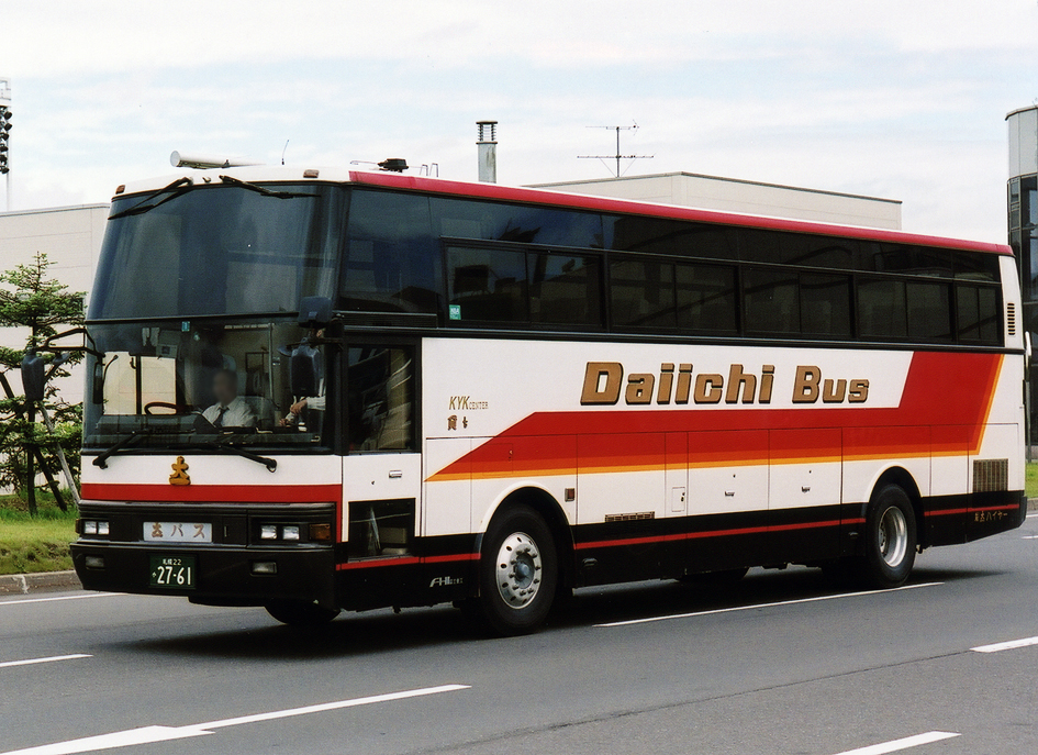 大一ハイヤー いすゞ・スーパークルーザー P-LV719R 富士重HD-II